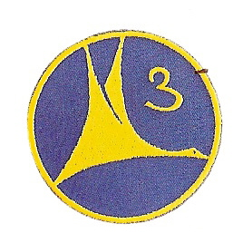 Wappen der Fliegerstaffel 3